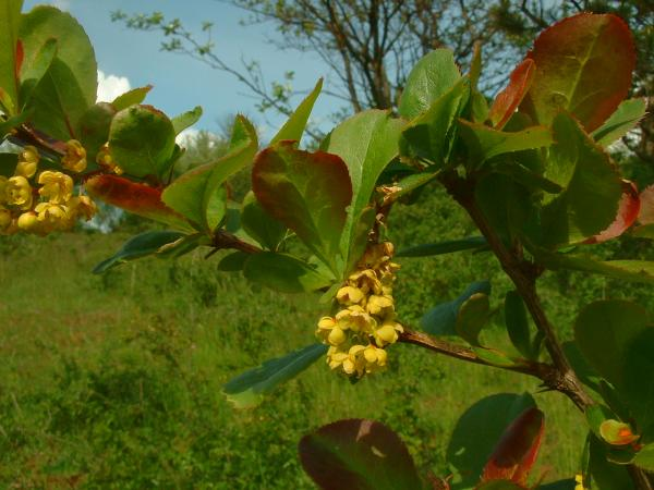 Berberis vulgaris - Épine vinette, Gy.